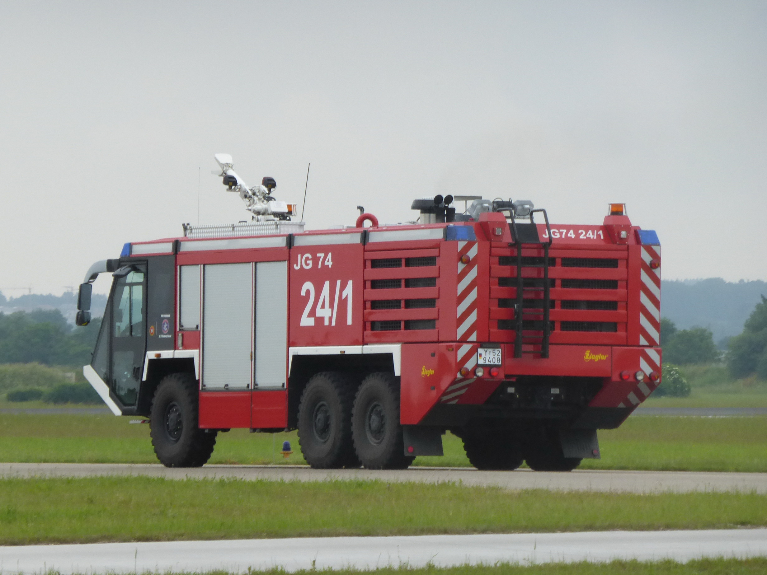 Flugfeldlöschfahrzeug 24/1 des JG 74 in Neuburg an der Donau am Tag der Bundeswehr 2016